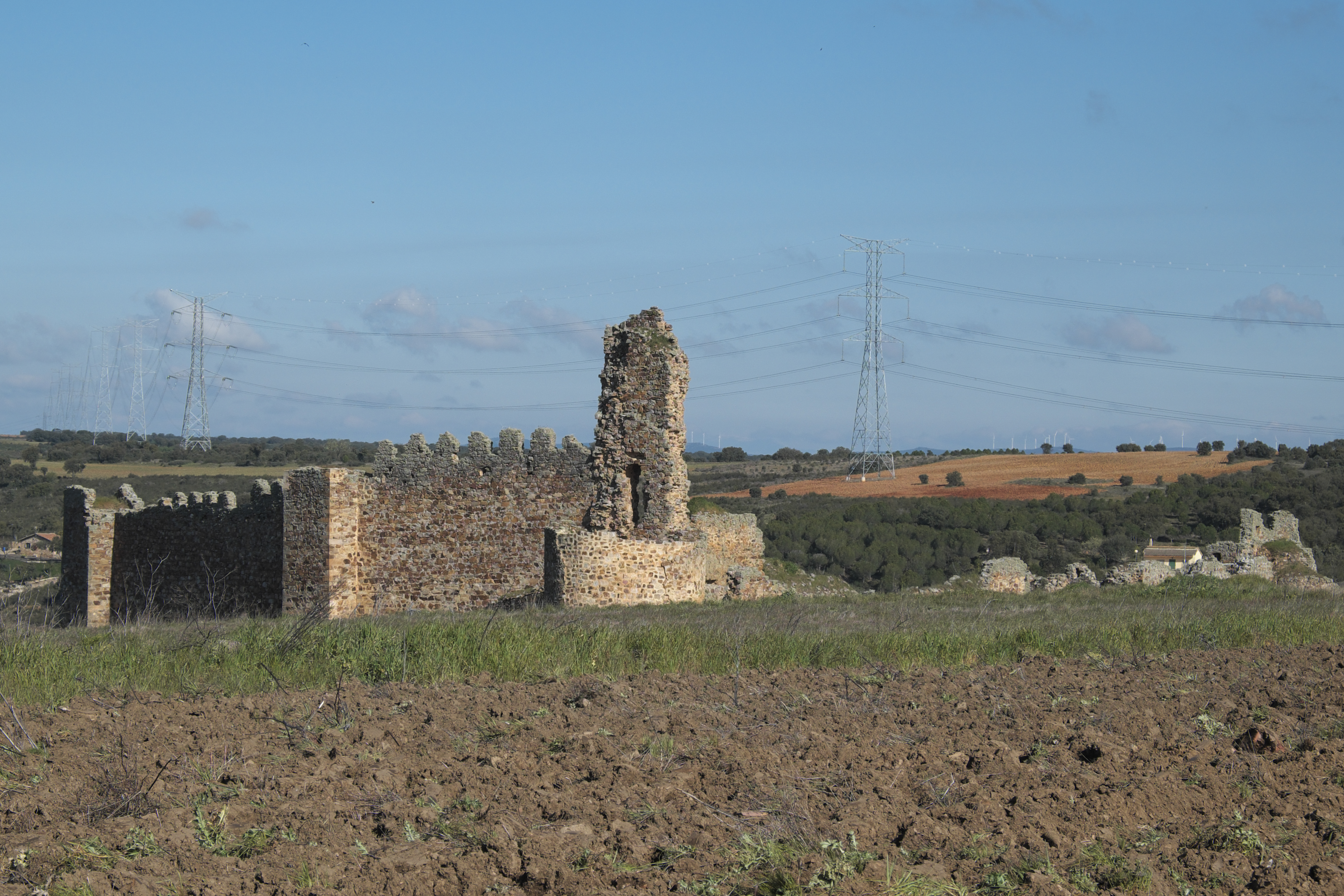 Aufgegebener Ort (despoblado) Castrotorafe in San Cebrián de Castro in der Provinz Zamora (Kastilien-León/Spanien)